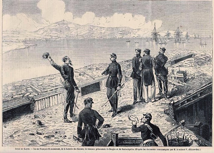 disegno Francesco II a Gaeta